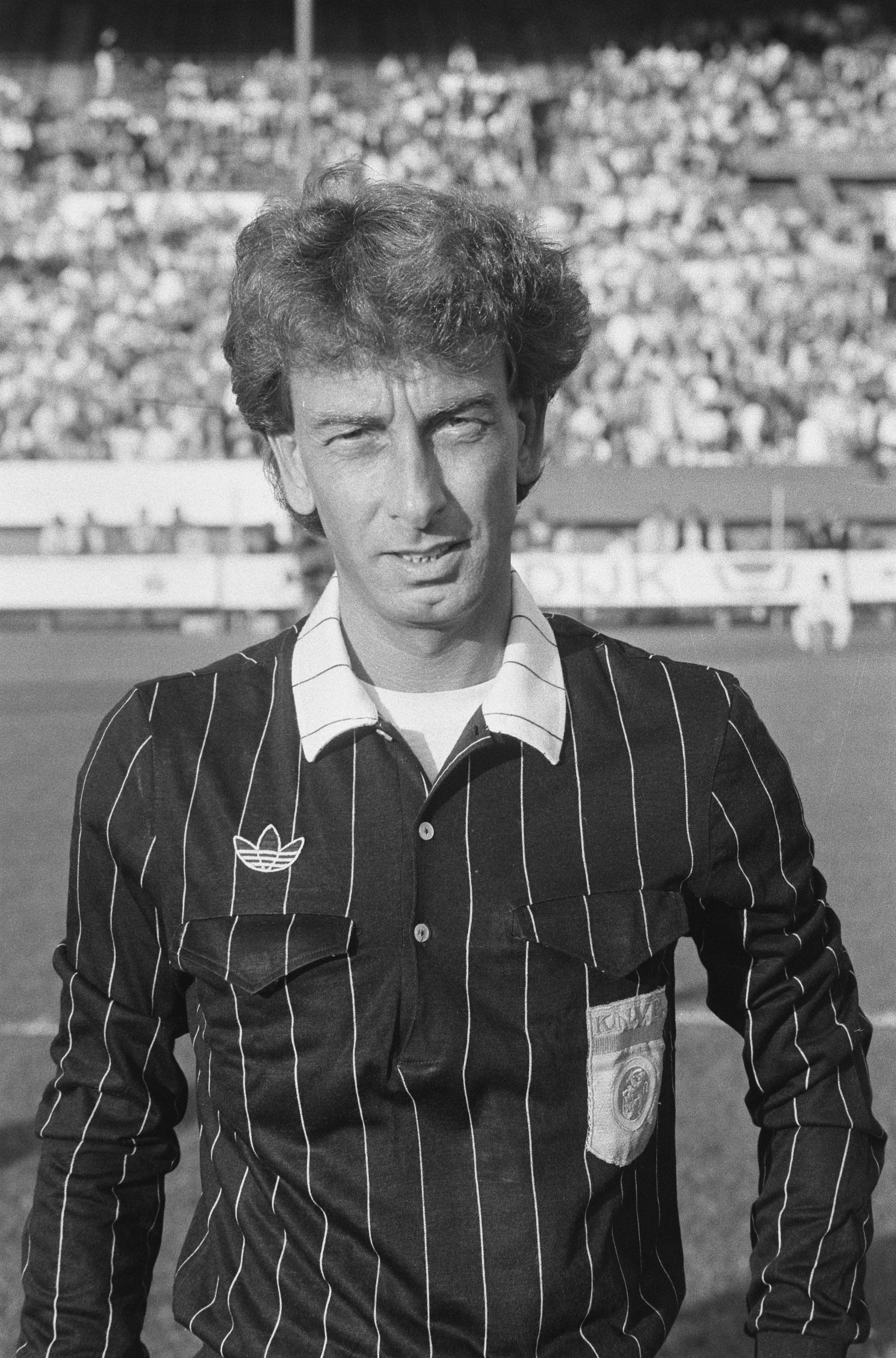 Collectie / Archief : Fotocollectie Anefo Reportage / Serie : [ onbekend ] Beschrijving : Sparta-PSV 1-1: ; scheidsrechter J. Blankenstein Datum : 17 augustus 1986 Trefwoorden : scheidsrechters, sport, voetbal Persoonsnaam : J. Blankenstein Fotograaf : Molendijk, Bart / Anefo Auteursrechthebbende : Nationaal Archief Materiaalsoort : Negatief (zwart/wit) Nummer archiefinventaris : bekijk toegang 2.24.01.05 Bestanddeelnummer : 933-7309